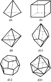 Dés dits "polyédriques" ou "multifaces".